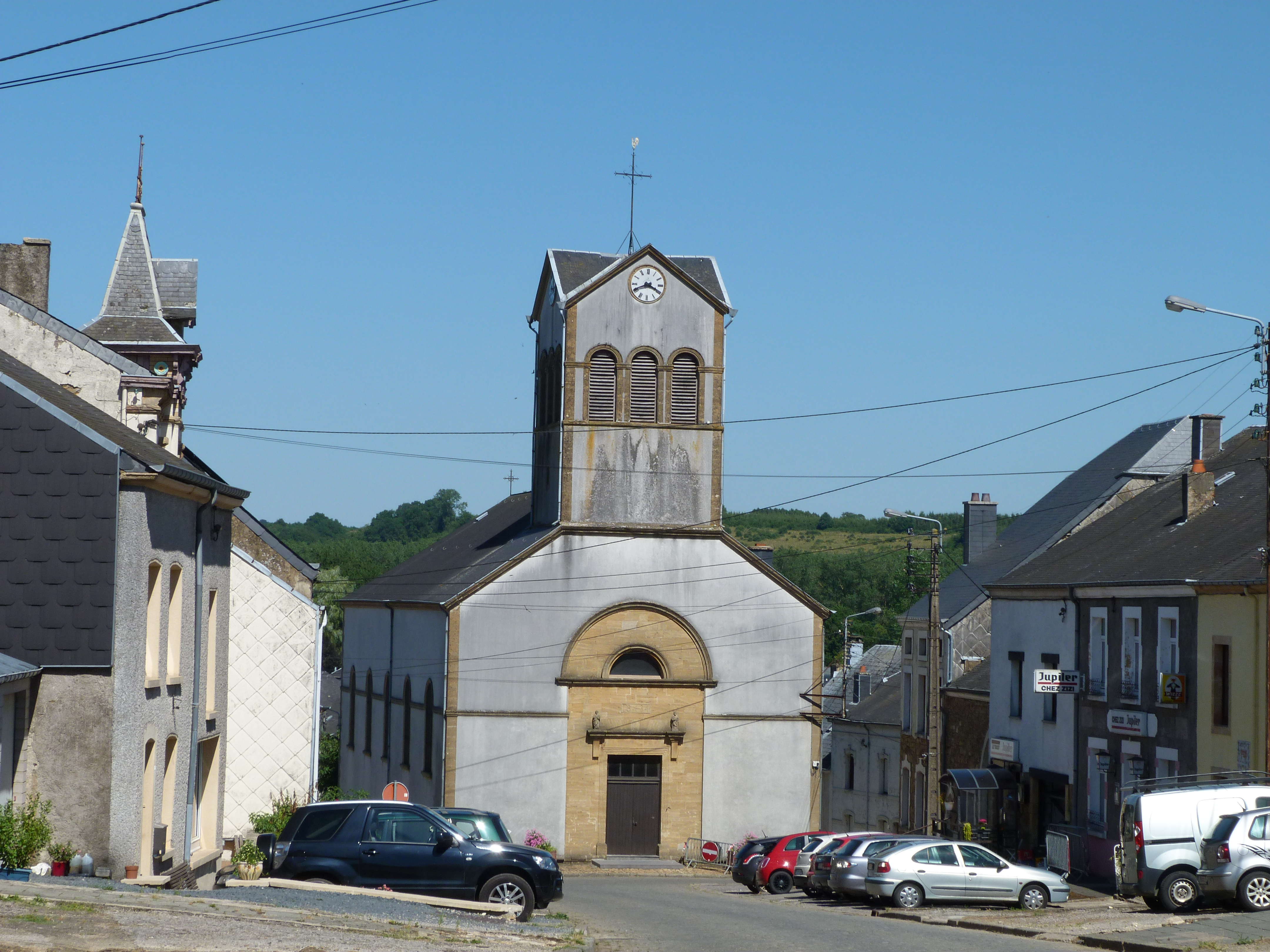 L'église de Mussy, de face, en août 2013. Notez la rue pavée.